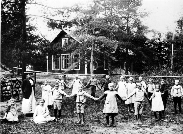 Görvälns skola, Järfälla. Klasskort, 1915. Lärarinnan Fanny Lagerlund stående till vänster med 18 elever.